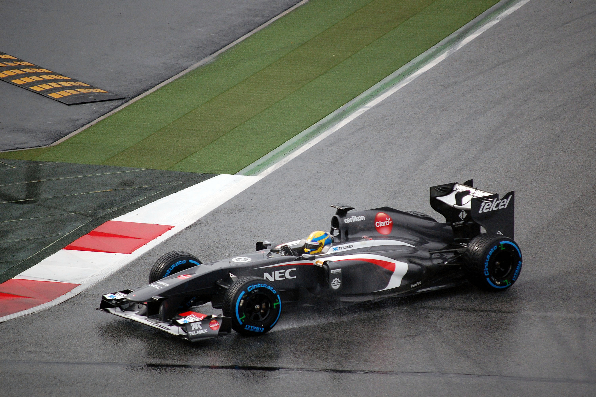 F1 test days 28/02/2013